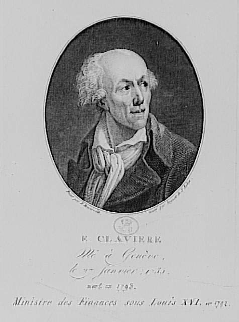 Étienne Clavière (* 29. Januar 1735; † 8. Dezember 1793), Bankier und Politiker